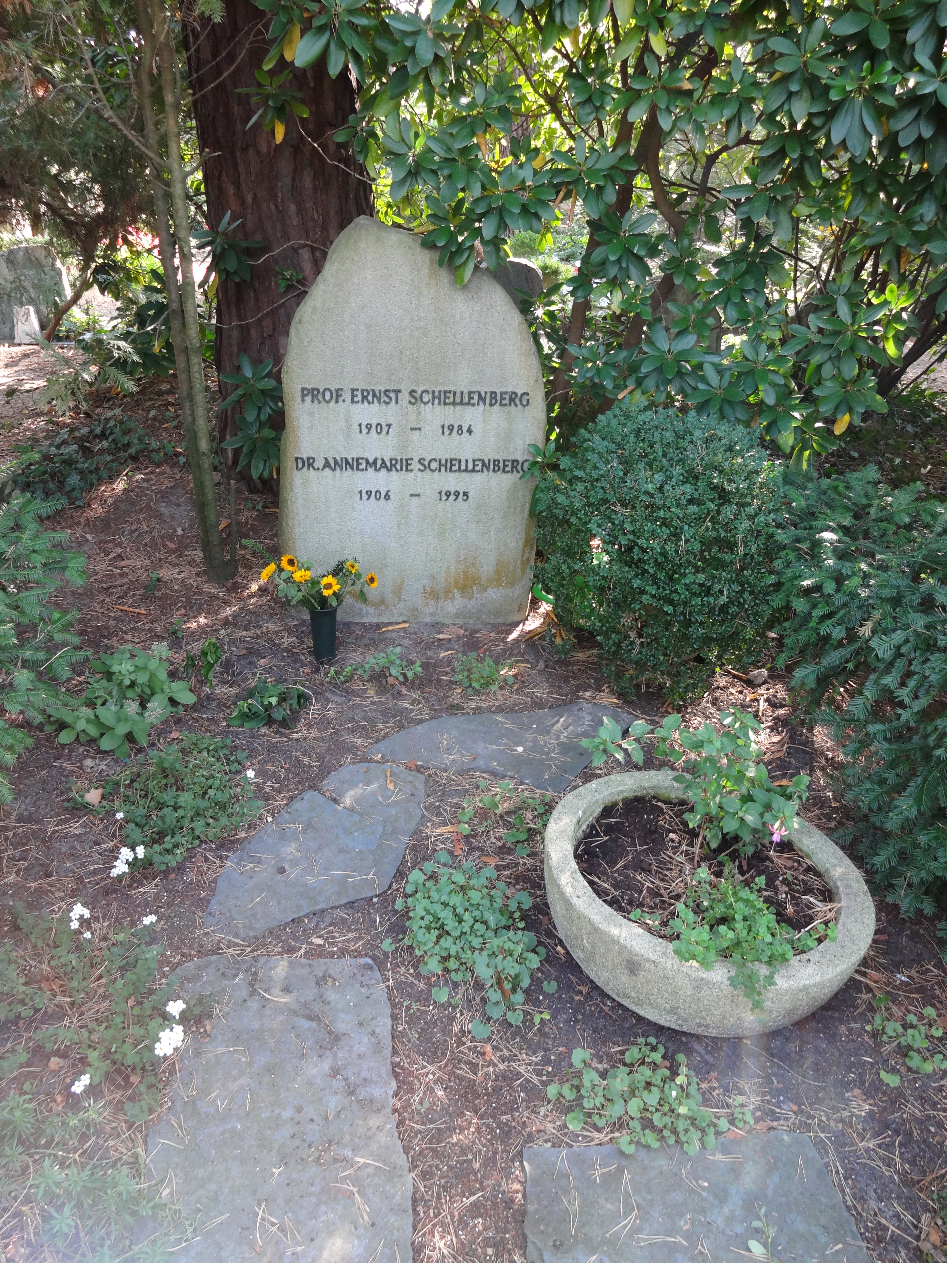 Grab von Prof. Ernst Schellenberg auf dem Waldfriedhof Dahlem in Berlin